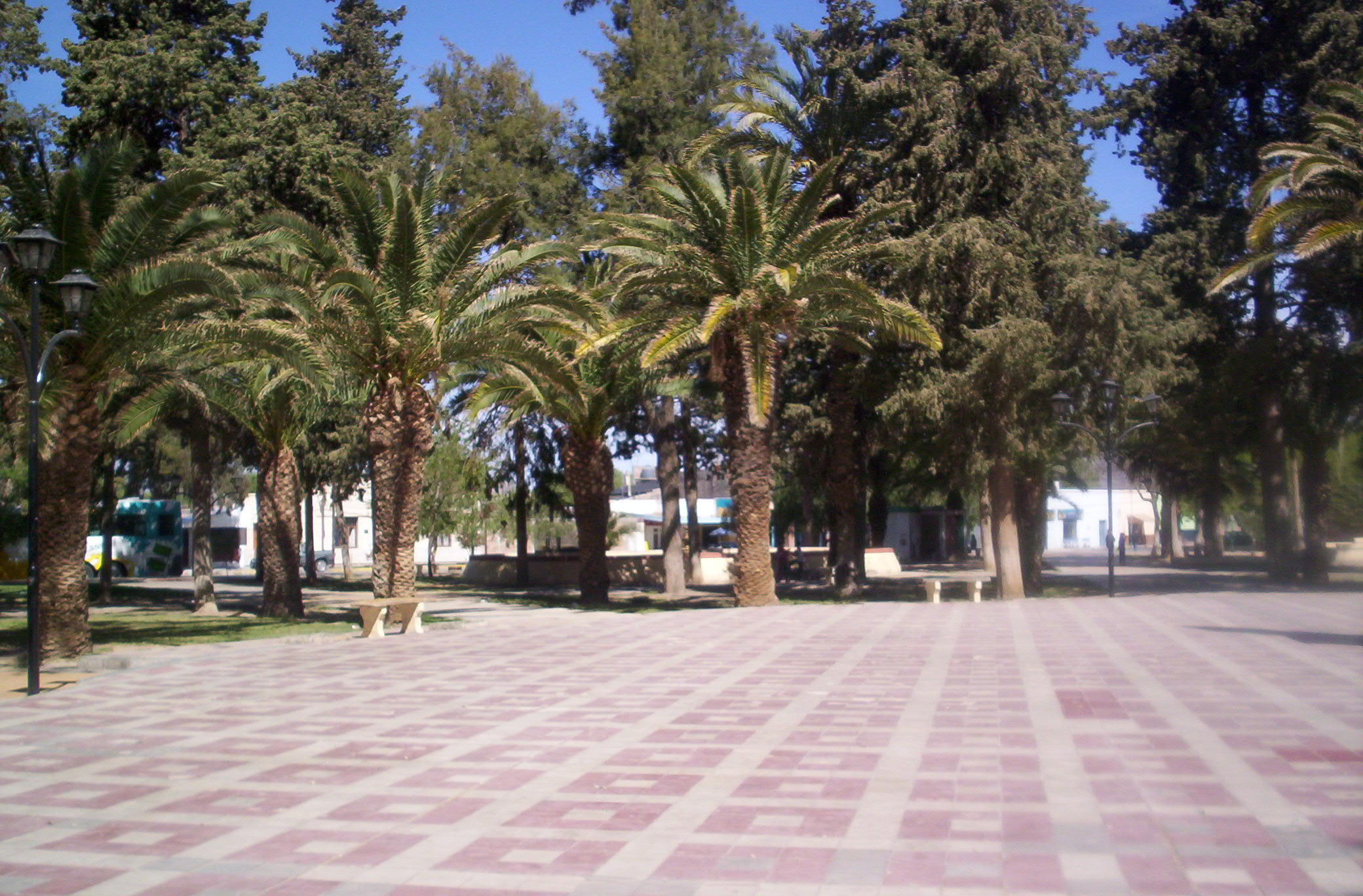 Vista de la plaza principal de la Ciudad de San José de Jáchal, provincia de San Juan, Argentina